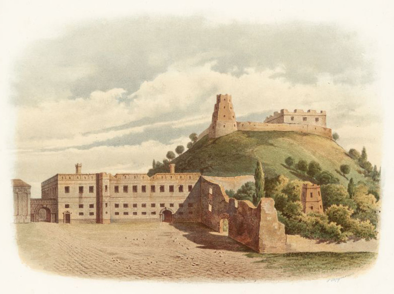 Беларуская (тарашкевіца): Вільня (Vilnia). Дольны замак (Dolny zamak), або палац вялікіх князёў літоўскіх